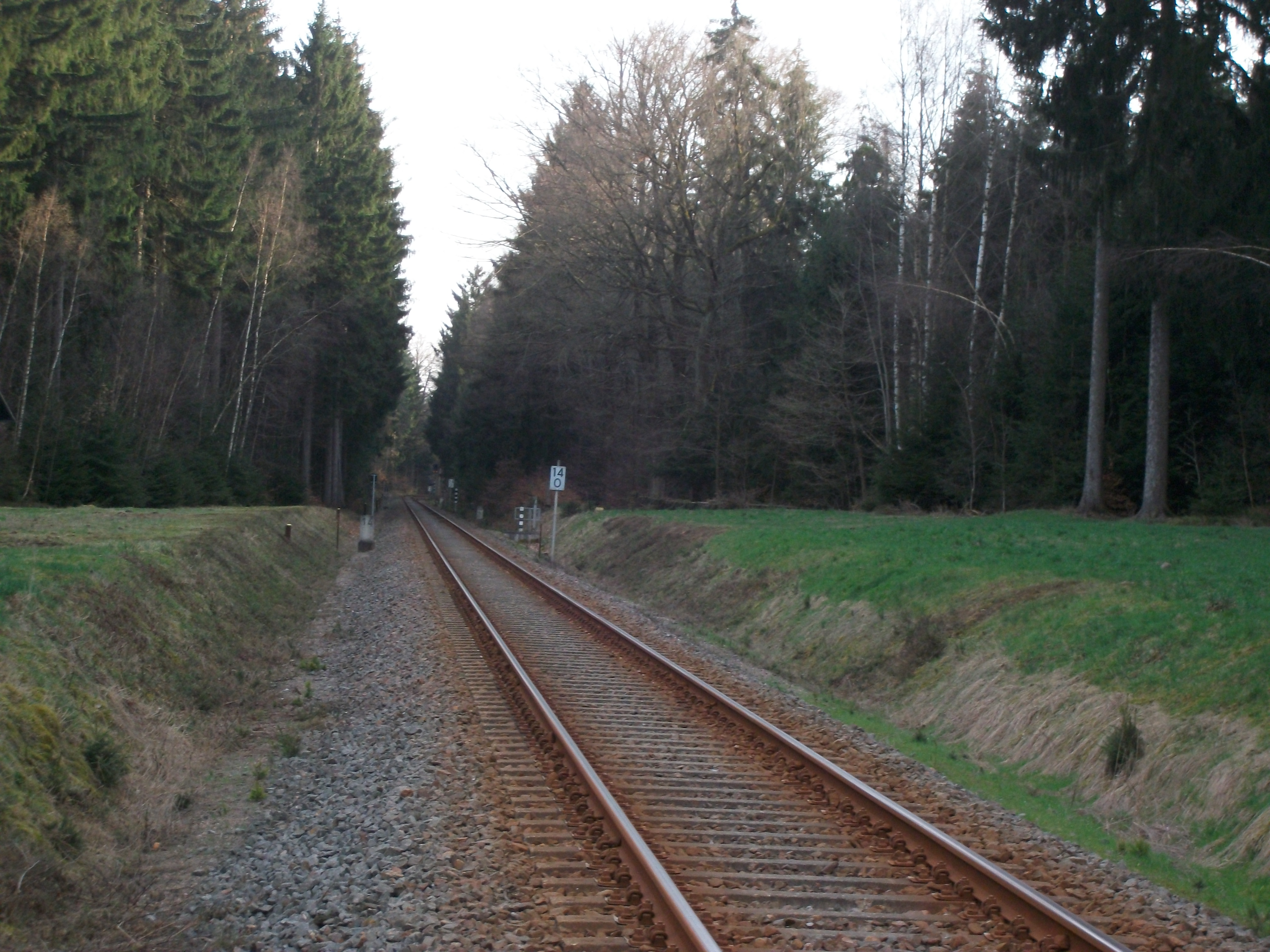 Bahnstrecke bei Irfersgrün (2016)